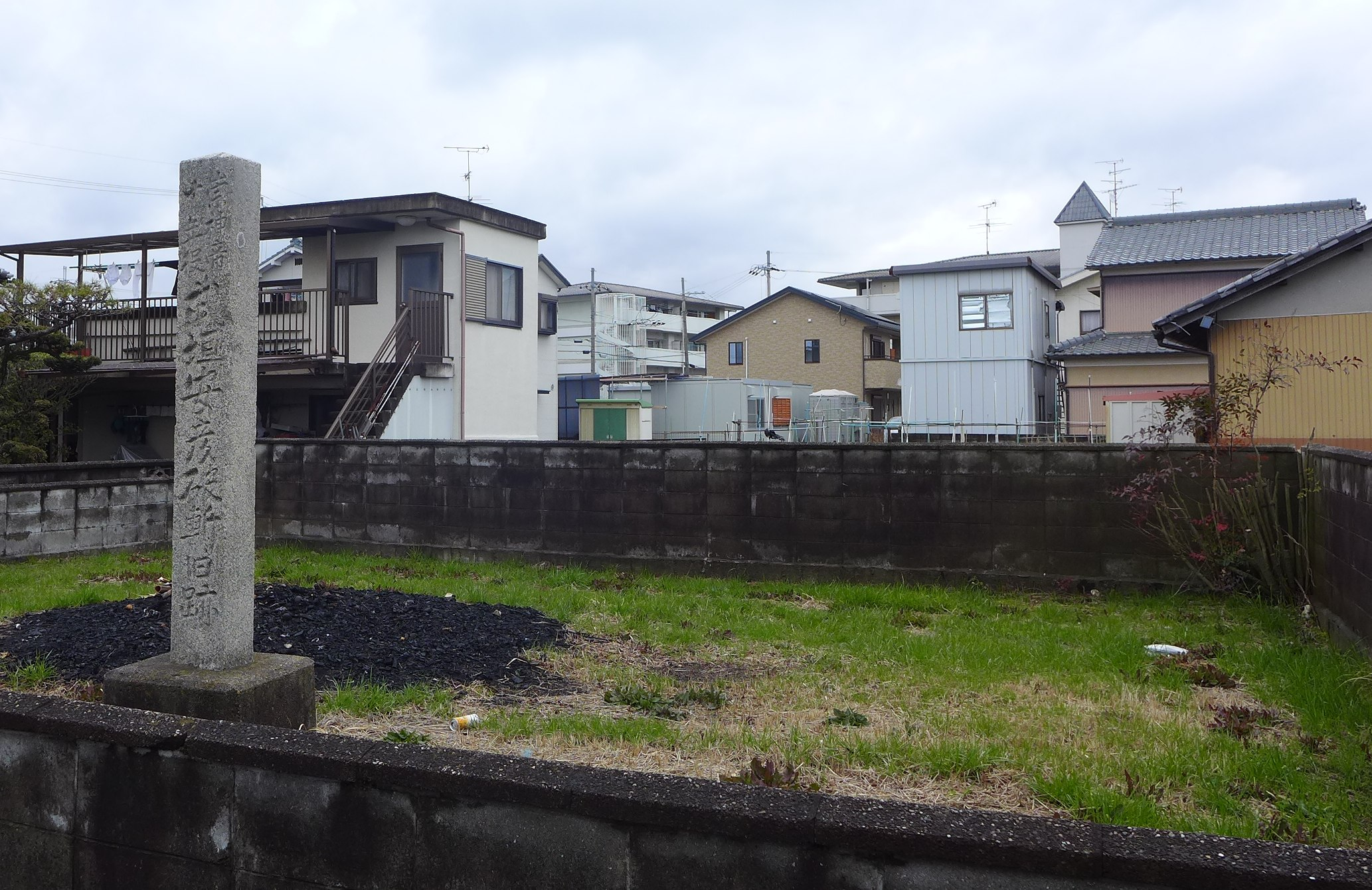 武埴安彦（たけはにやすひこ）が討伐されたという場所（崇神天皇10年）